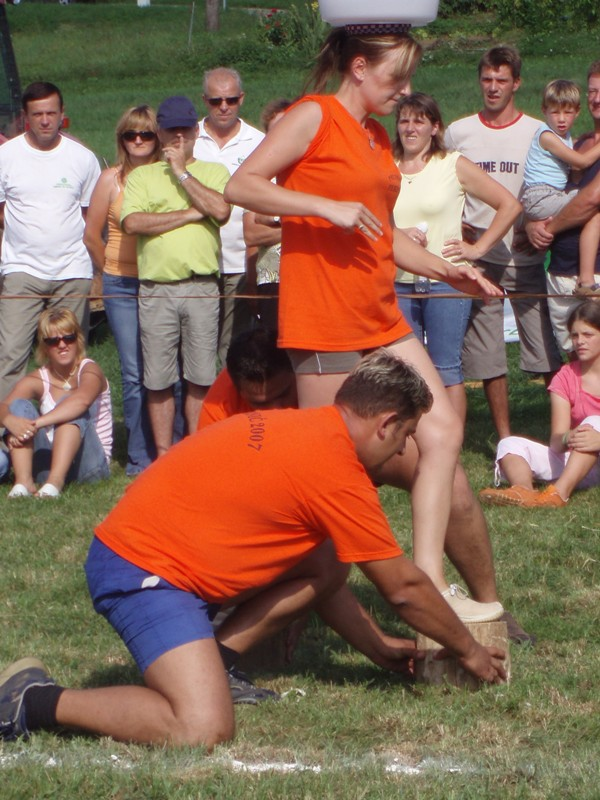 Vaške igre Dobrnič 2007, avgust 2007